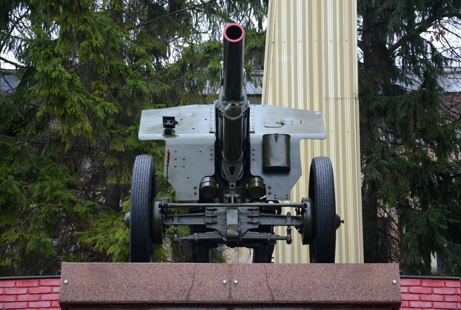 122 мм гаубица М-30 "МАРУСЯ" установлена 19.11.2018 на пьедестал памятника воинам артиллеристам на территории бышего КВАКУ.